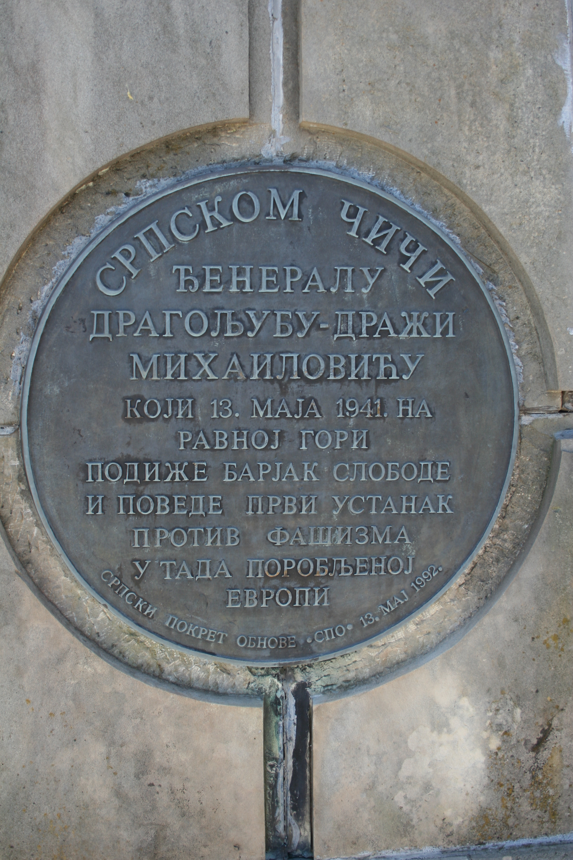 Spomen kompleks Ravna Gora